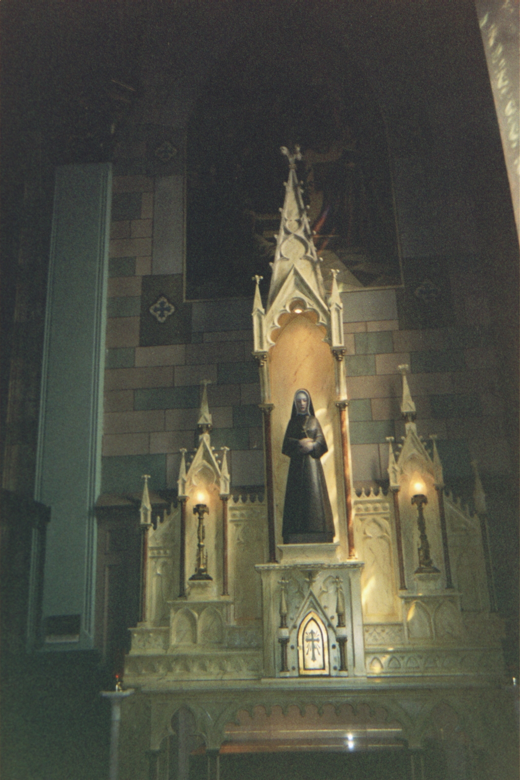 Statue de la Bienheureuse Marie-Rose Durocher à la cocathédrale Saint-Antoine-de-Padoue de Longueuil (Québec). Photo prise par ADM le 24 juillet 2005. Licence